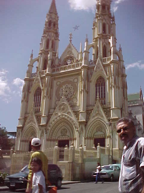 Iglesia de Palo Grande en municipio Libertador, Distrito Capital - Venezuela